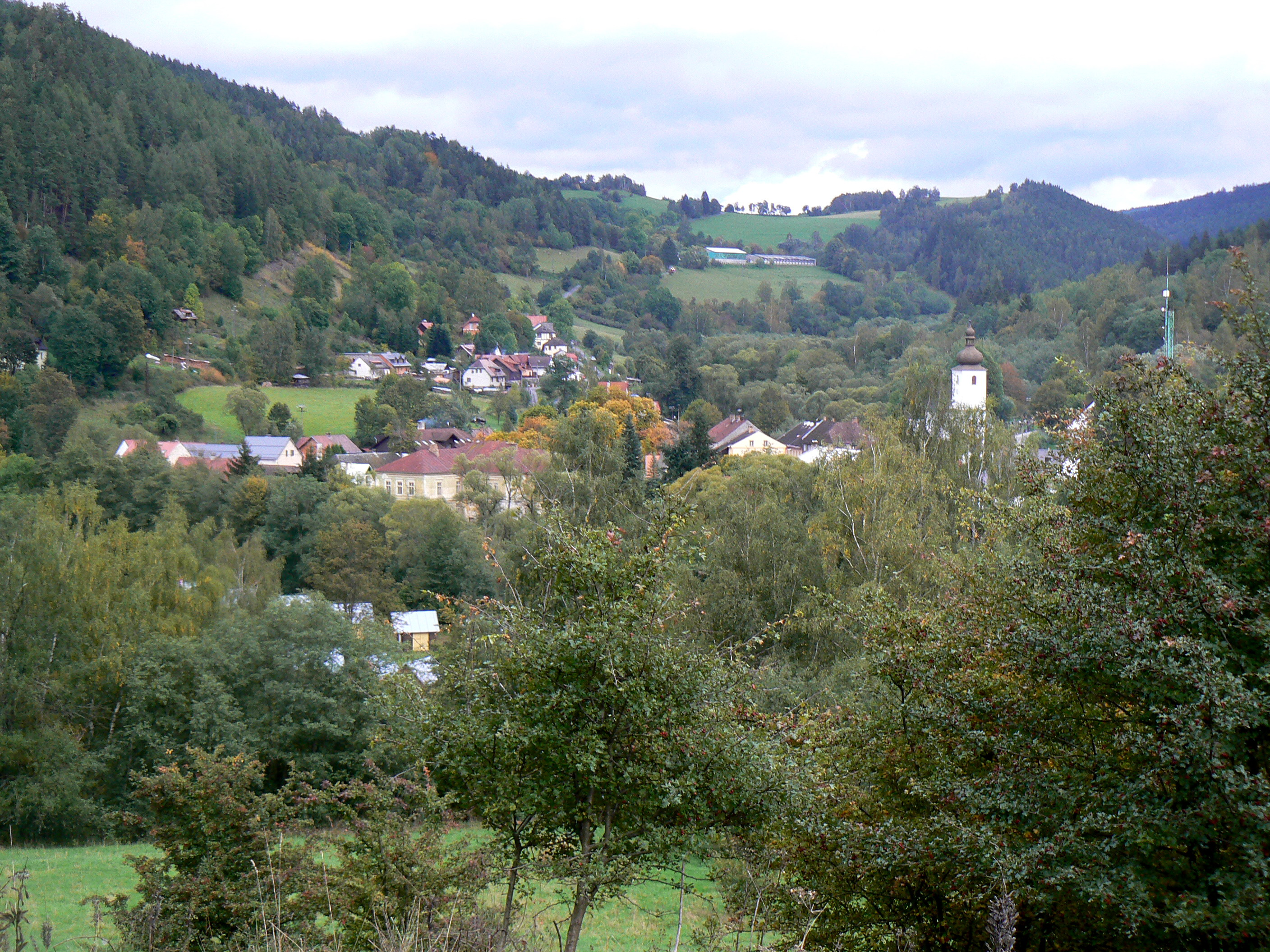 Rejstejn, Sumava, Czech Republic